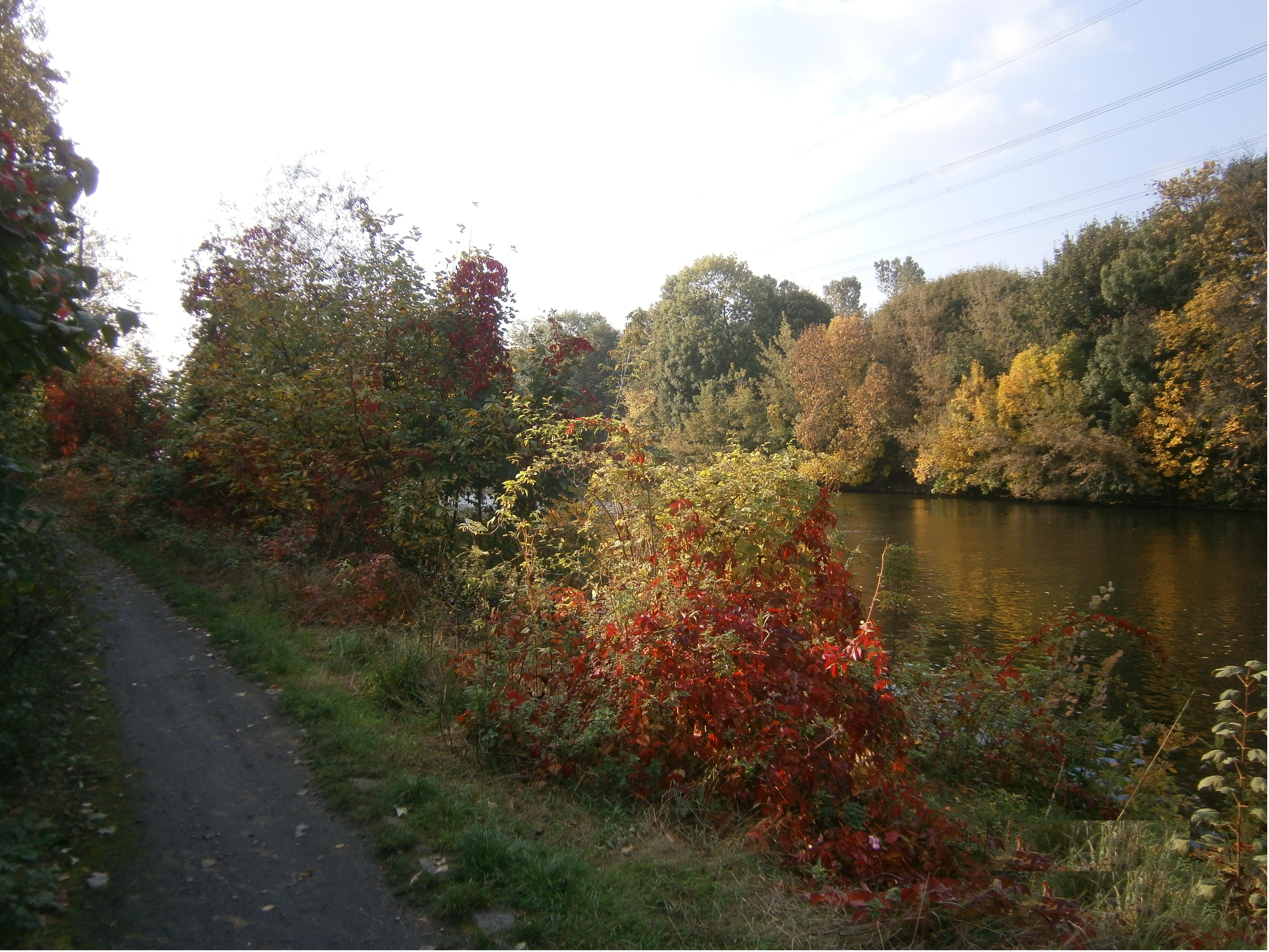 Der Spreeweg ist einer der 20 grünen Hauptwege in Berlin. Hier der Weg westlich der Schleuse Charlottenburg in Höhe der KGA Spreegrund der Weg neben der Spree im Ortsteil Berlin-Westend.